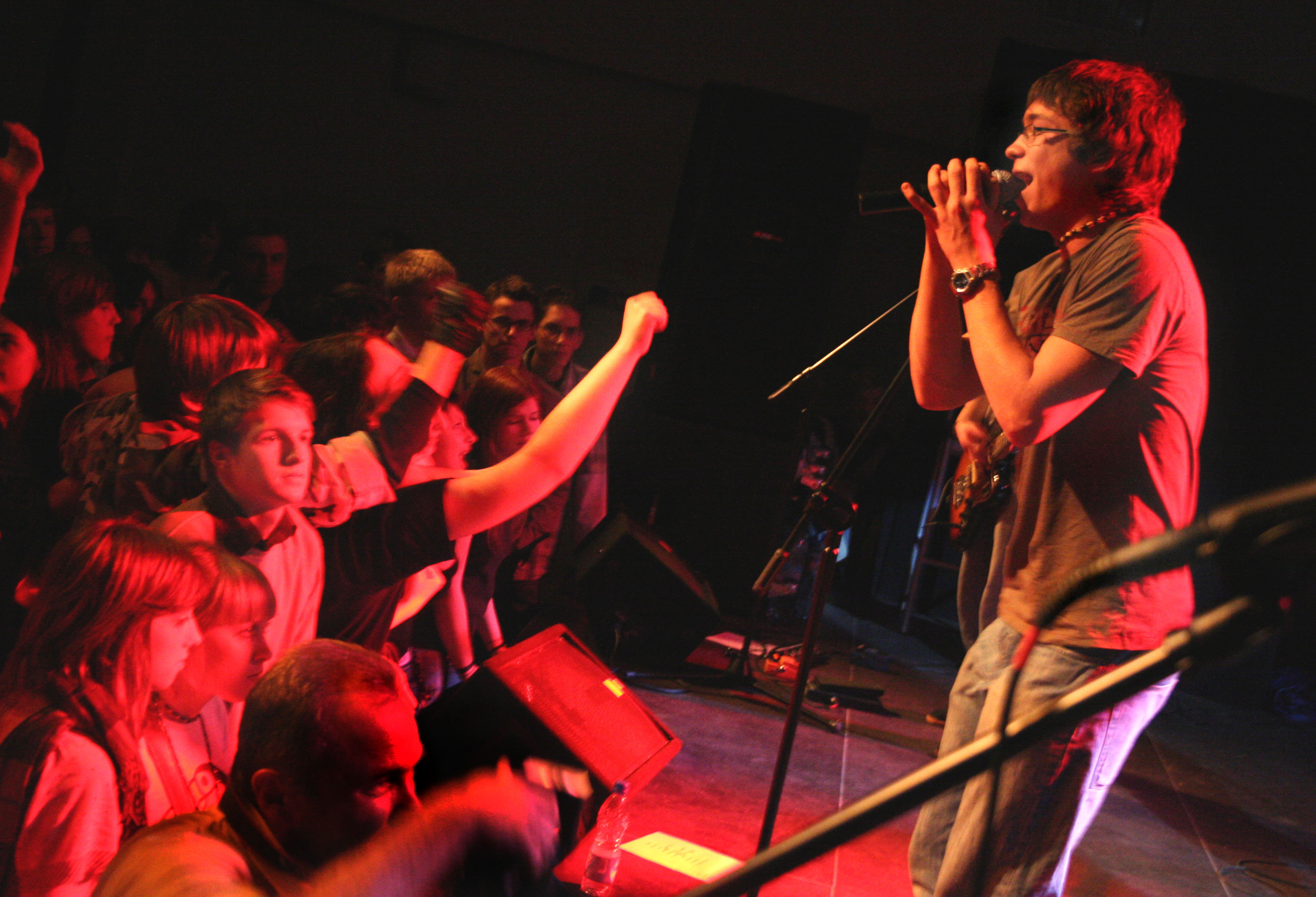 'Mariusz Oborski, koncert MUTE